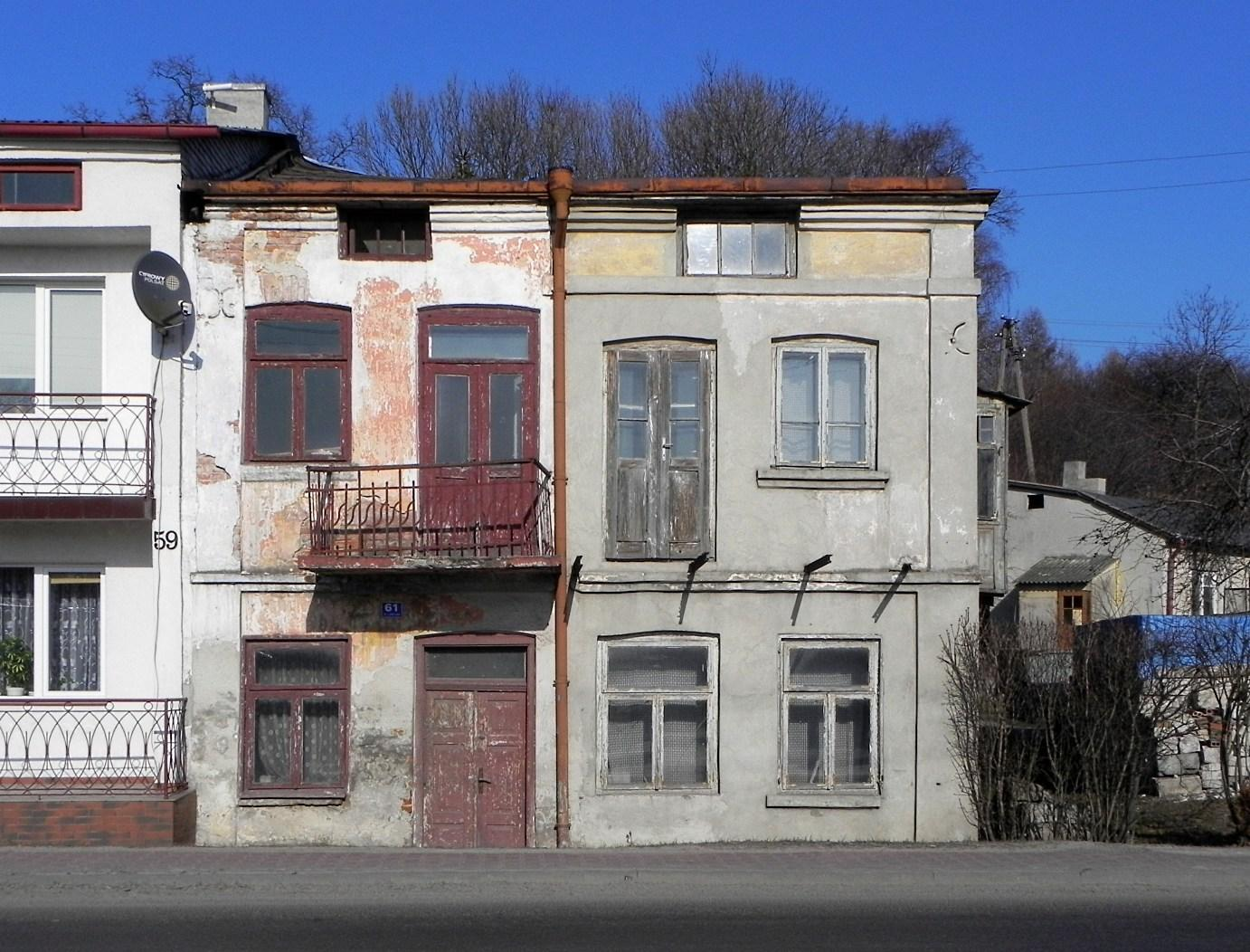 Ulica Lubelska 61.